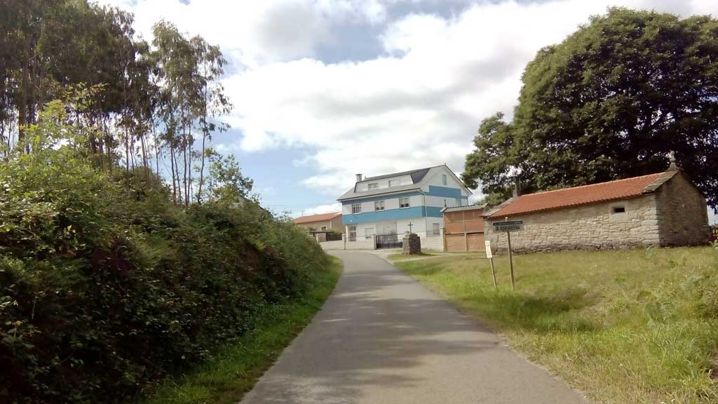 Vista da Espiñeira, Curtis.